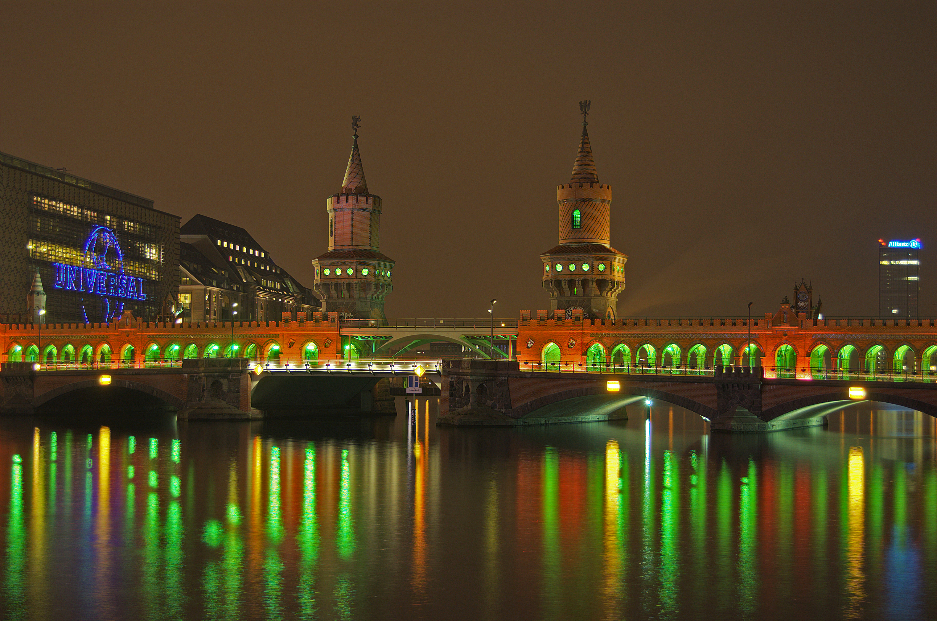 Berlin: illuminierte Oberbaumbrücke während des Festival of Lights 2007